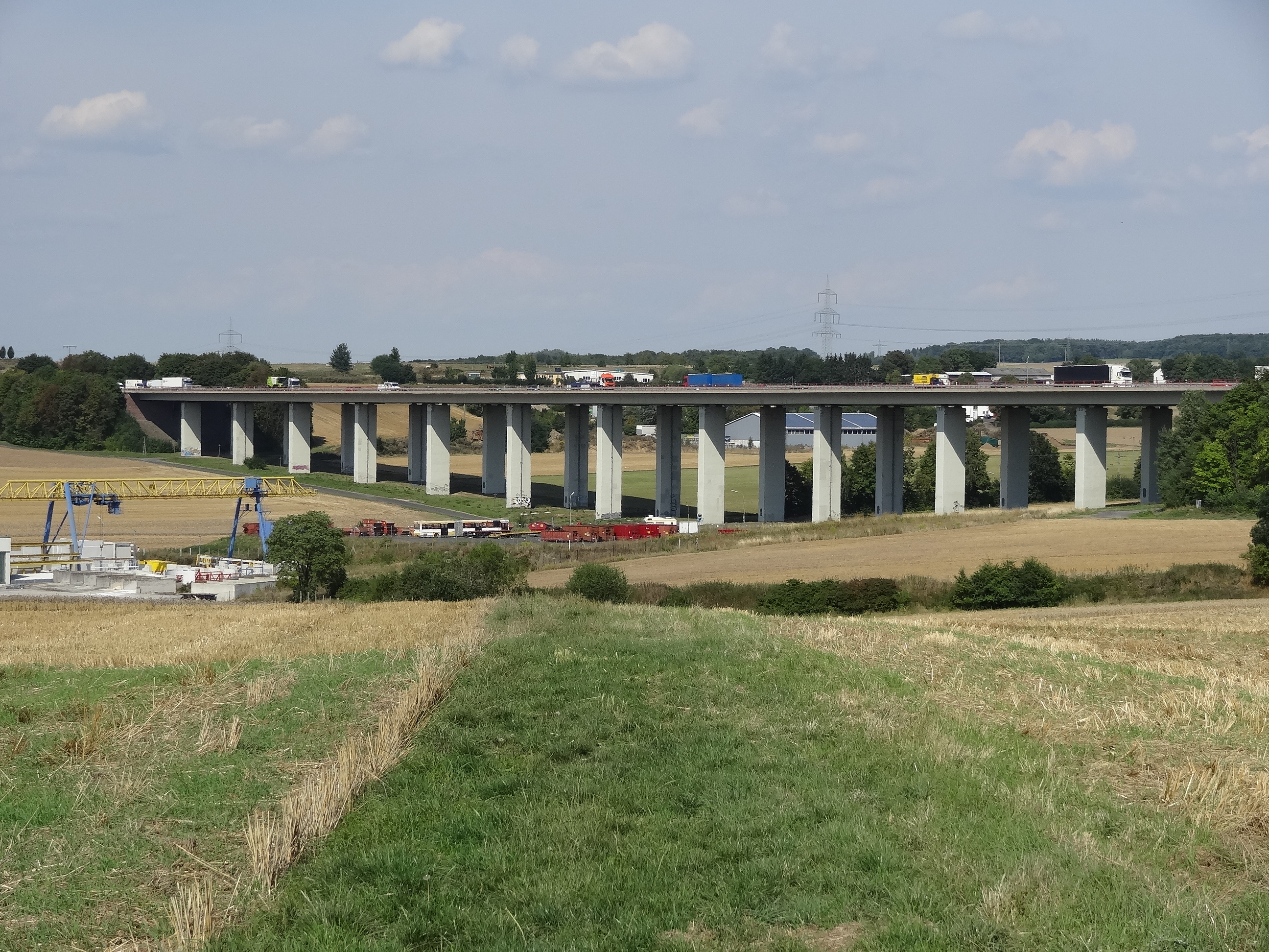 Talbrücke Langgöns